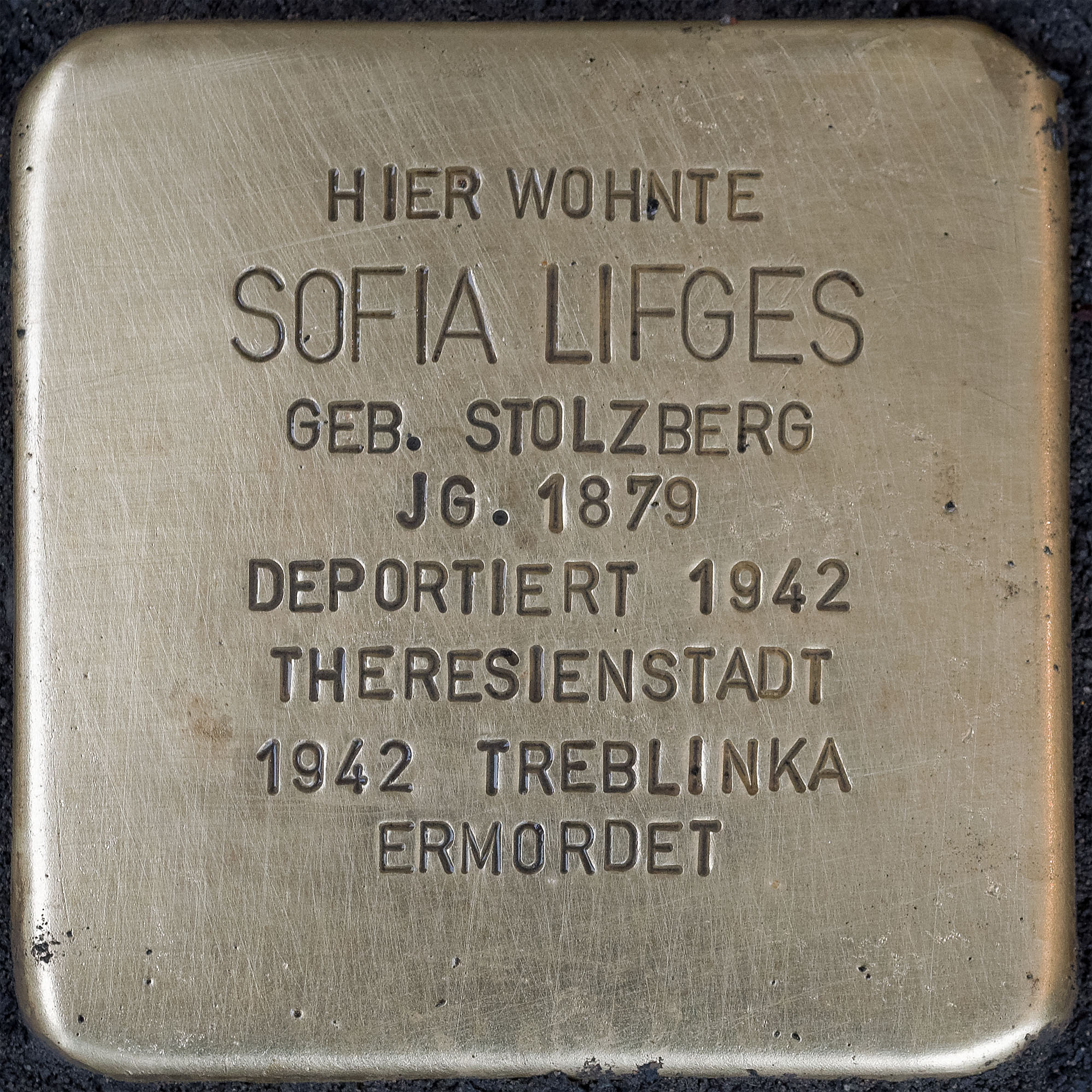 Stolpersteine Suechteln: Lifges, Sofia